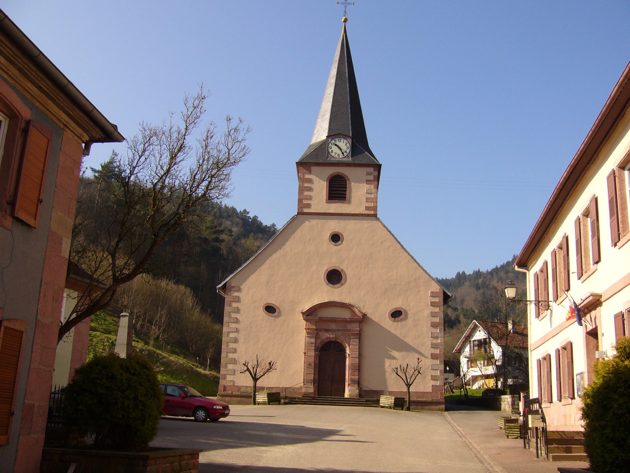 Eglise Sainte Rosalie au centre du village